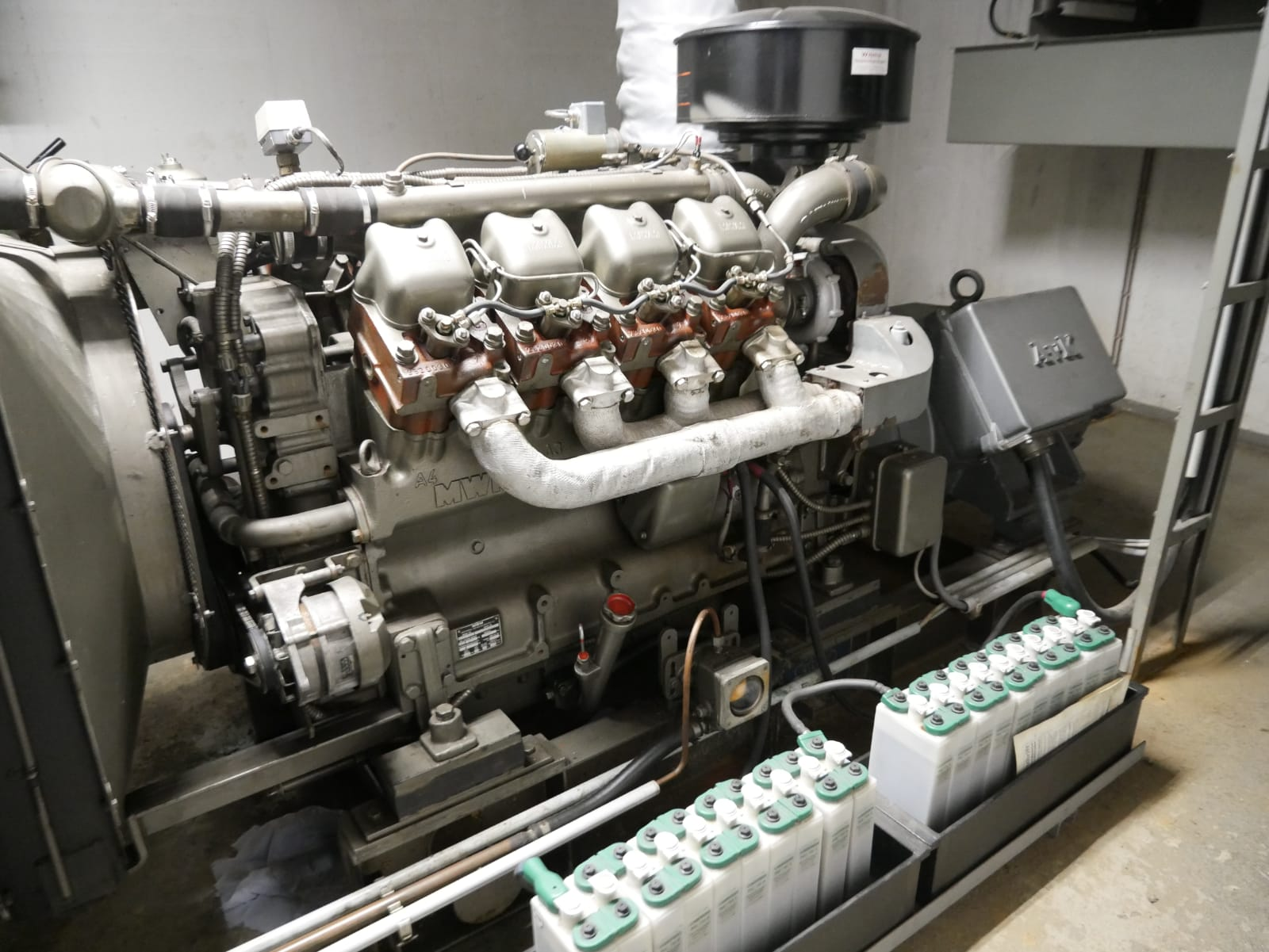 Der Dieselmotor der den Bunker als Notstromaggregat mit Strom versorgen kann.